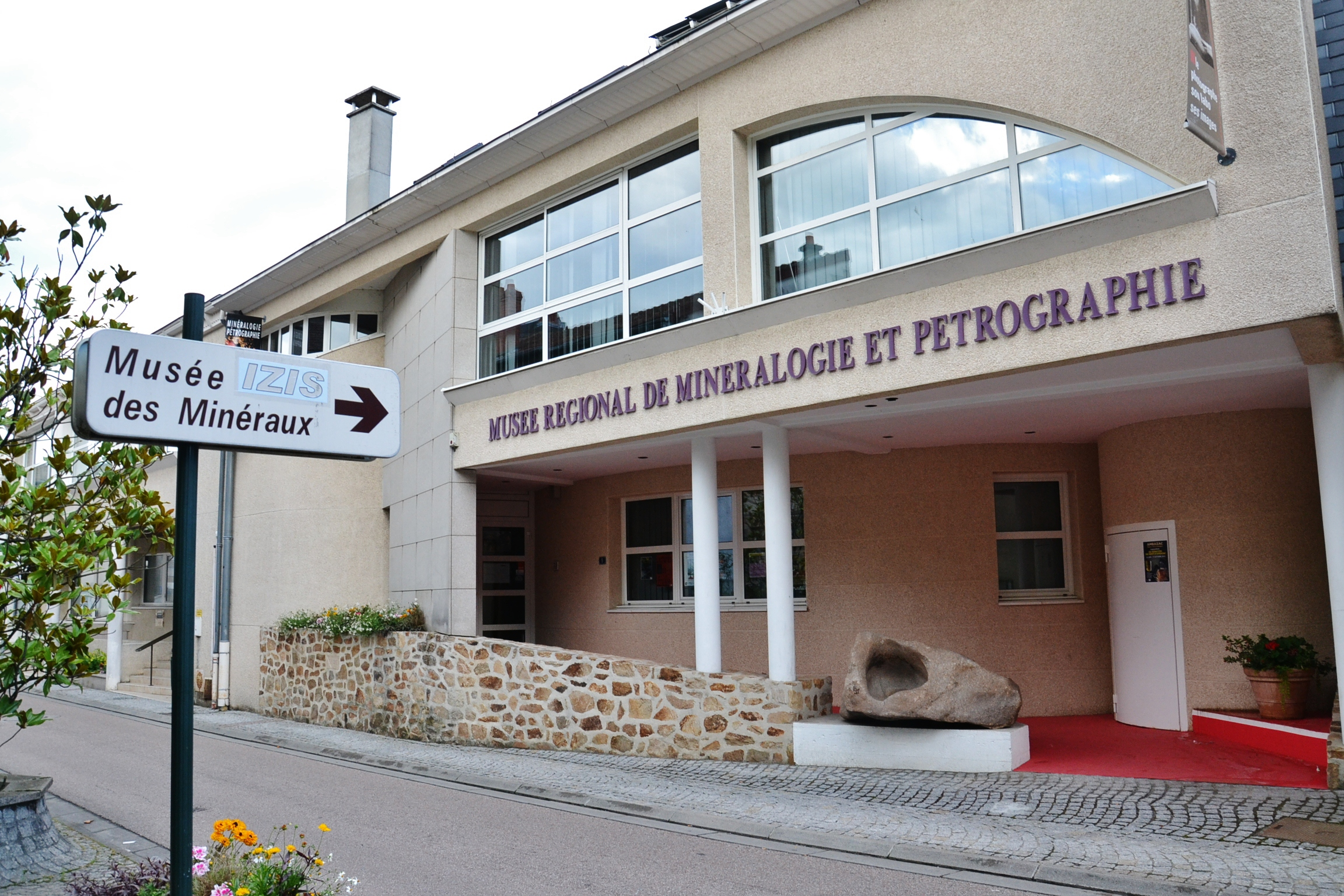 Musée de minéralogie et de pétrographie d'Ambazac (Haute-Vienne, France)